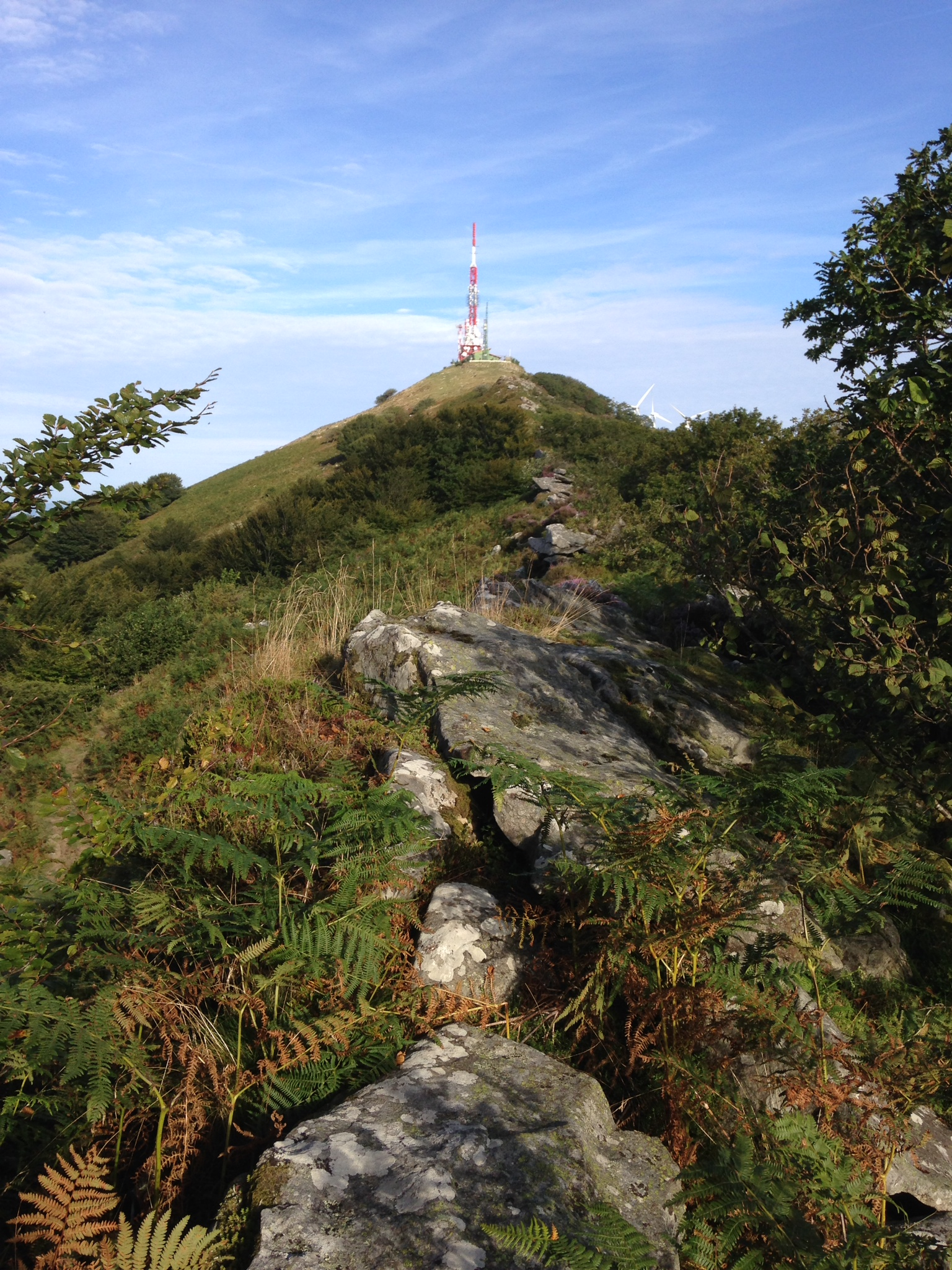 Vista de la cumbre del monte Oiz en Vizcaya, País Vasco (España)